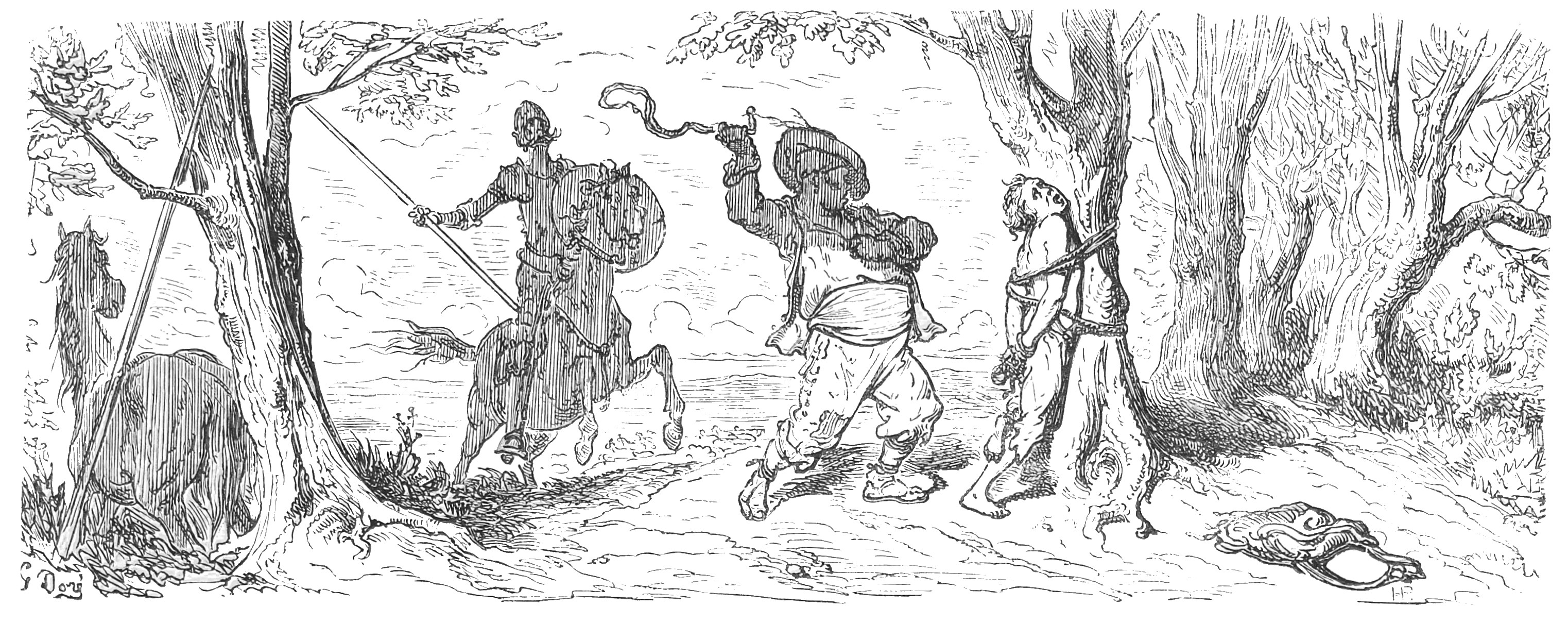 "Dom Quixote encontra o moço a ser vergastado" (1863) iIustração por Gustave Doré para “Don Quixote“ de Miguel de Cervantes.